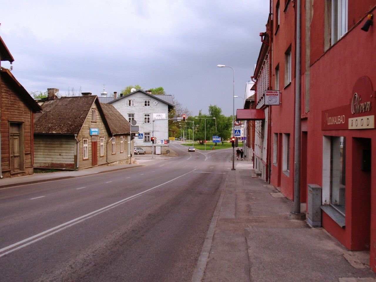 Narva maantee Tartus, vaade Narvamäelt linna poole.